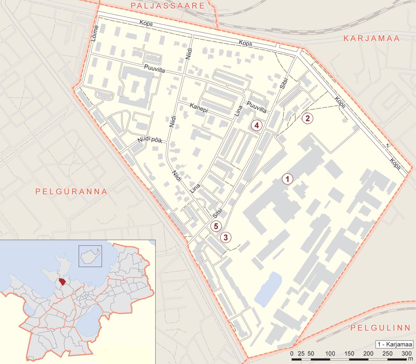 Sitsi asumi kaart